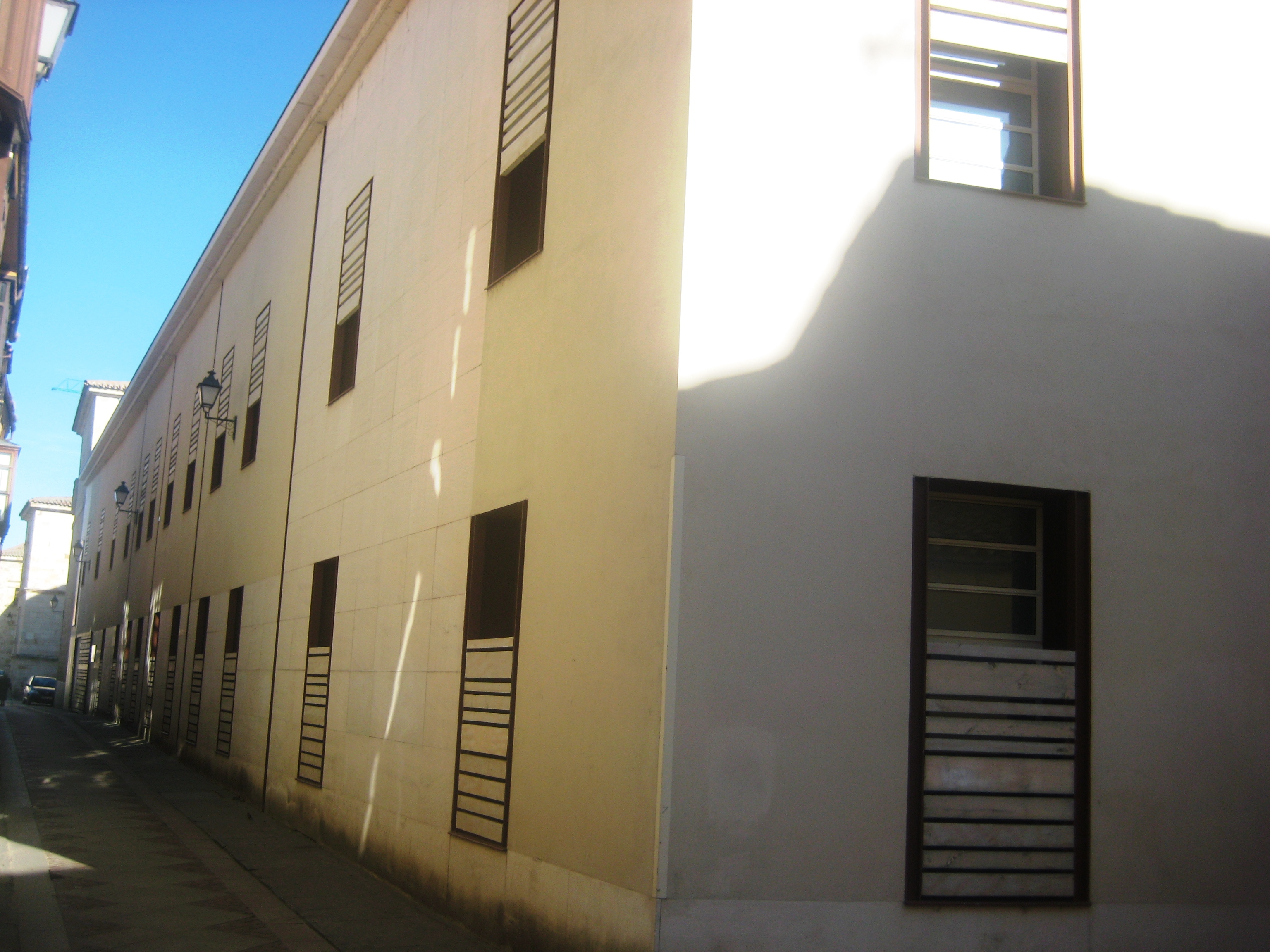 Archivo Histórico Provincial de Zamora